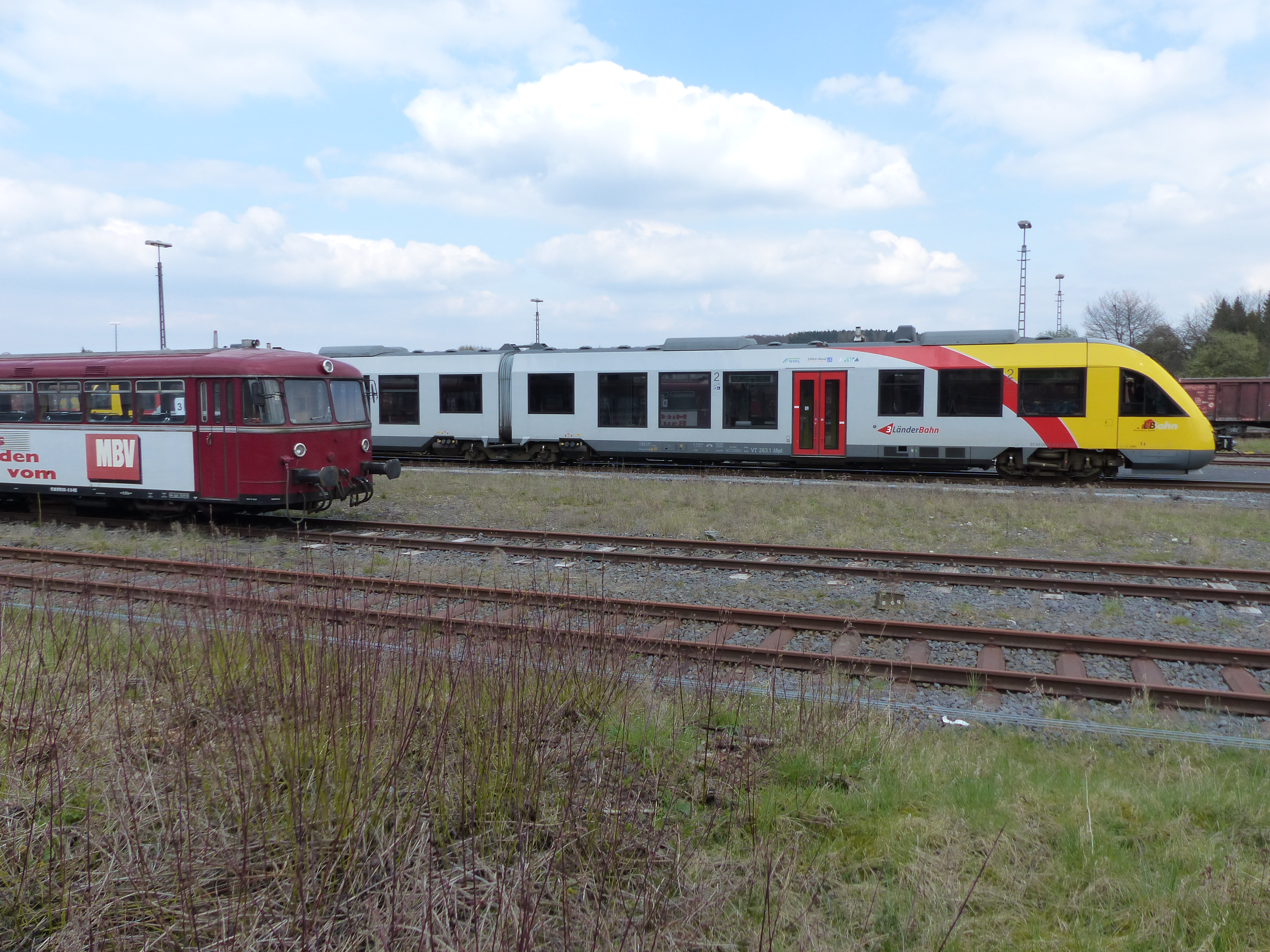 Nach Limburg abfahrender Triebwagen der HLB im Bahnhof Siershahn, links abgestellt einen Schienenbus